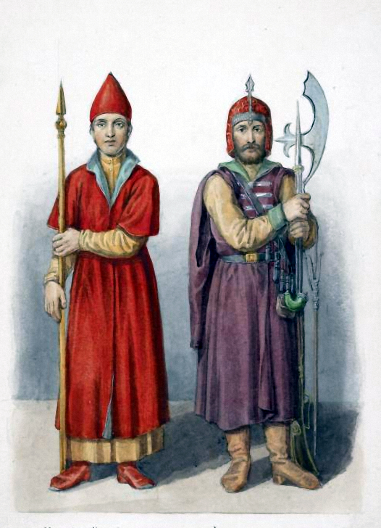 Патриарший огненник. Одежда стрельца. XVII век.